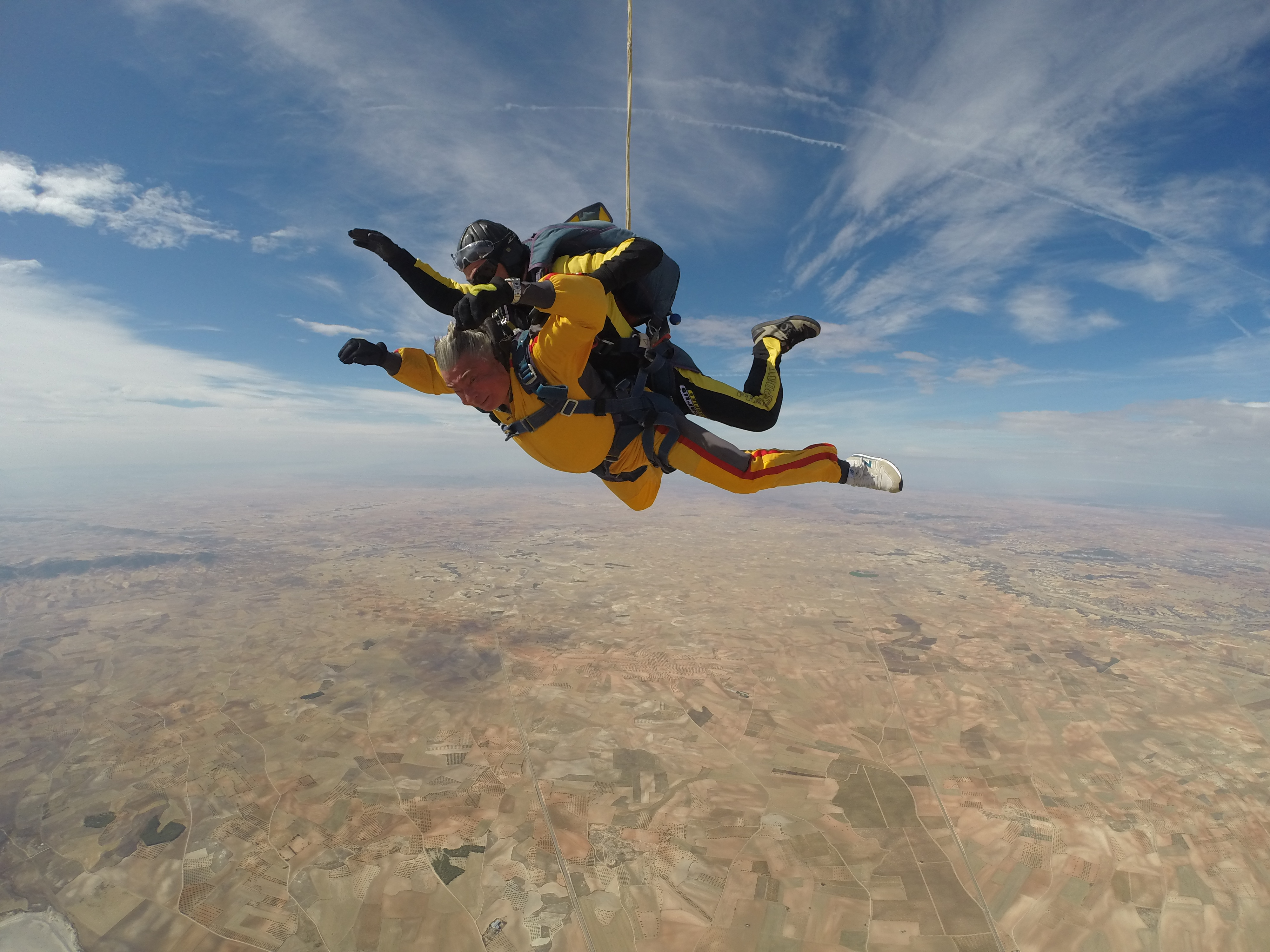 Mi primer salto en paracaidas Julio Gomez Piqueras nacido el 16 de Mrazo de 1943 Viajero , esquiador, budeador y amigo de mis amigos y enemigo de todos aquellos que se lucran con la politica.